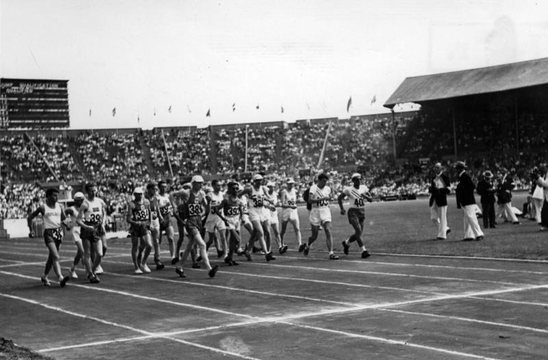 London, Olympiade, Sart der Geher Illus dpd Start zum 50-Kilometer-Gehen: 23 Mann waren am Start zum 50 Kilometer-Gehen angetreten, das auf der letzten Olympiade von dem Engländer Whitlook so überraschend gewonnen werden konnte. Auf der diesjährigen Olympiade gelang es dem Sieger, dem Schweden Ljunggren (Nr.398) nicht, den damaligen Rekord zu unterbieten. Er erreichte nur 4 Std. , 41 Minuten, 52 Sekunden gegenüber dem olympischen Rekord von 1936 mit 4 Std., 30 Minuten, 41,4 Sekunden. Zweiter wurde der Schweizer Godel. Dritter der Engländer Johnson. 2-8-48 1900-48